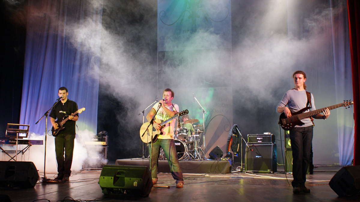 Fara Zahar in concert la Iasi, Casa de Cultura a Studentilor, 2009.